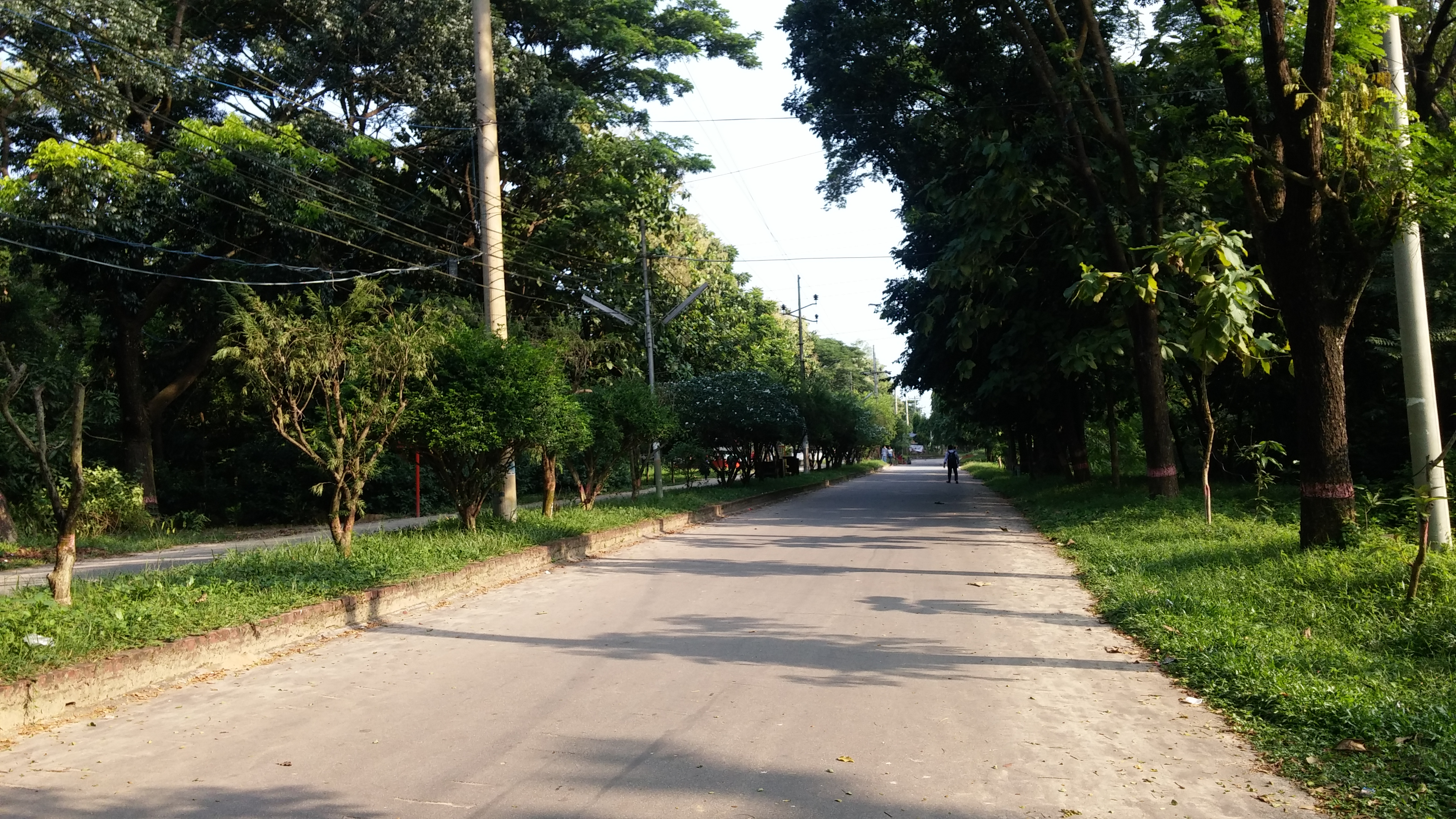 চুয়েট মেইন রোড